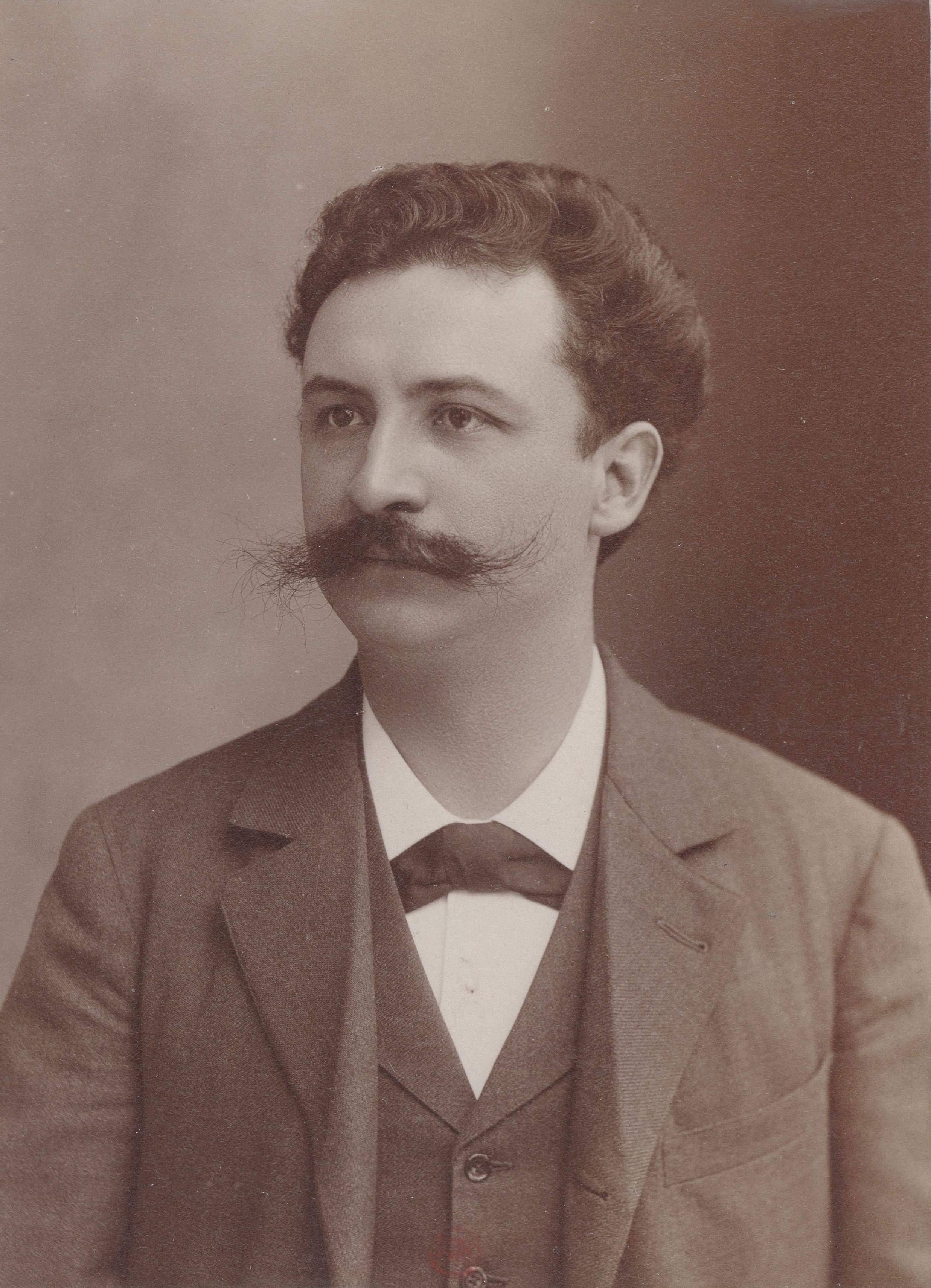 Photographie de Xavier Leroux par Nadar entre 1875 et 1895